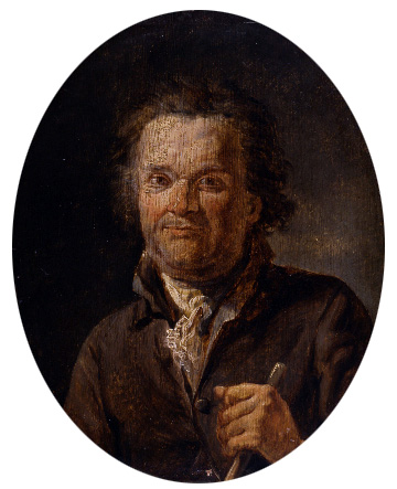 Autoportrait de Constantin d'Aix